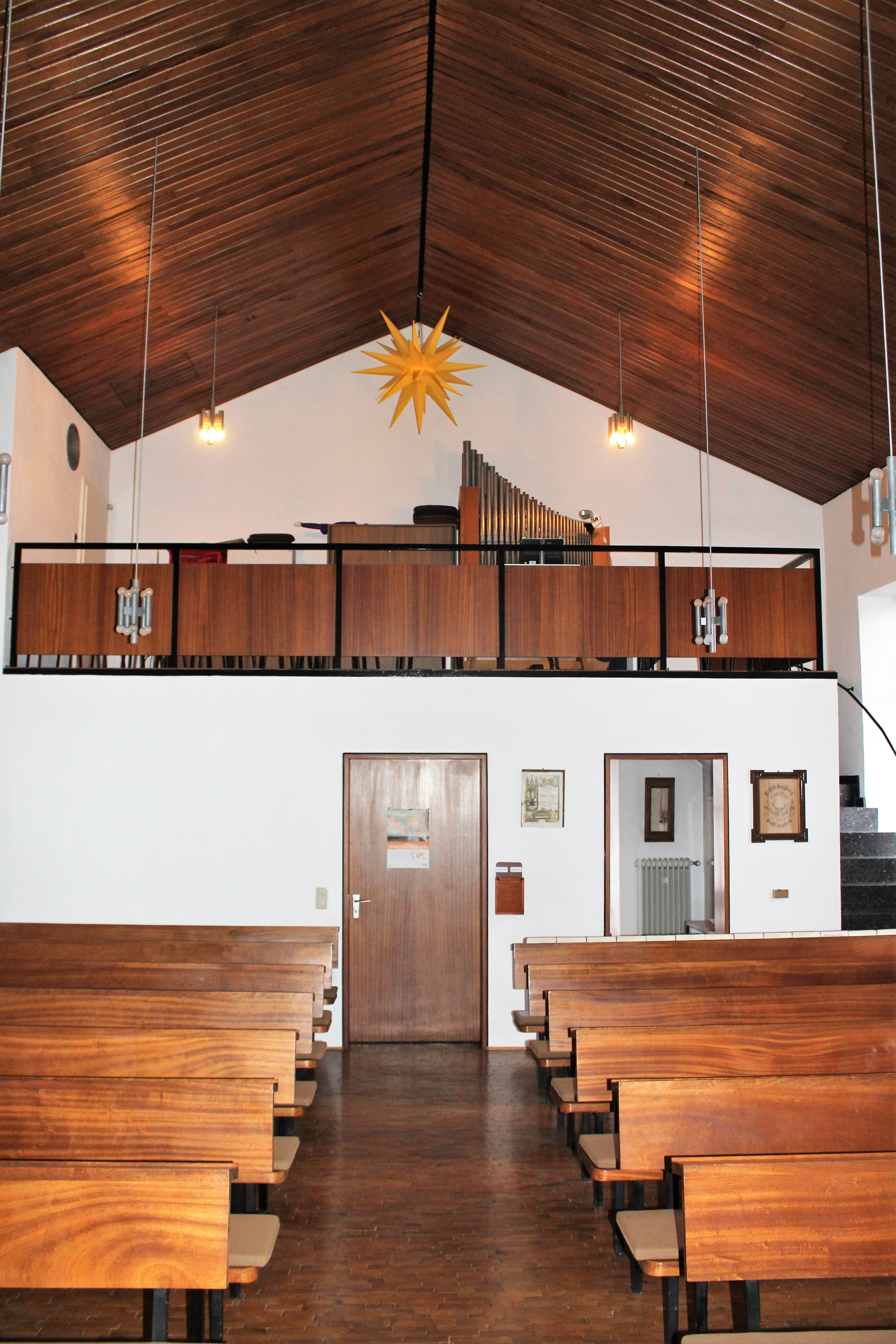 Ev. Kirche Espa, Langgöns, Landkreis Gießen, Hessen, Deutschland